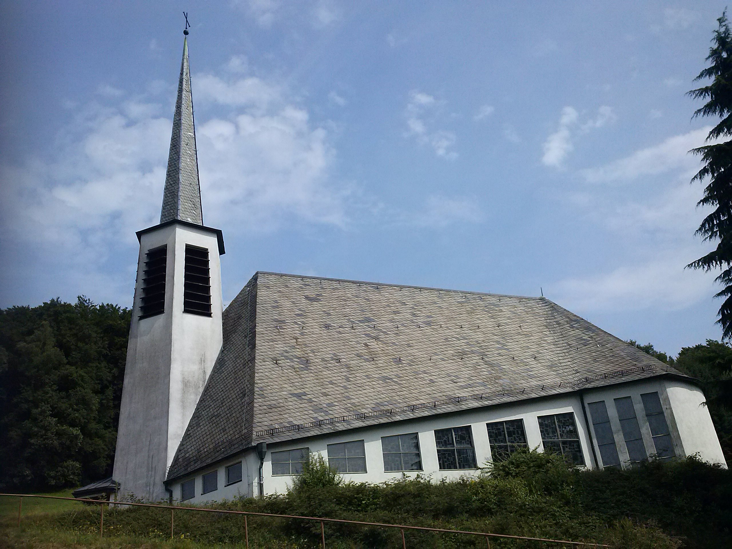 Die katholischen Dreifaltigkeits-Kirche von Kocherbach (Wald-Michelbach) im Odenwald.